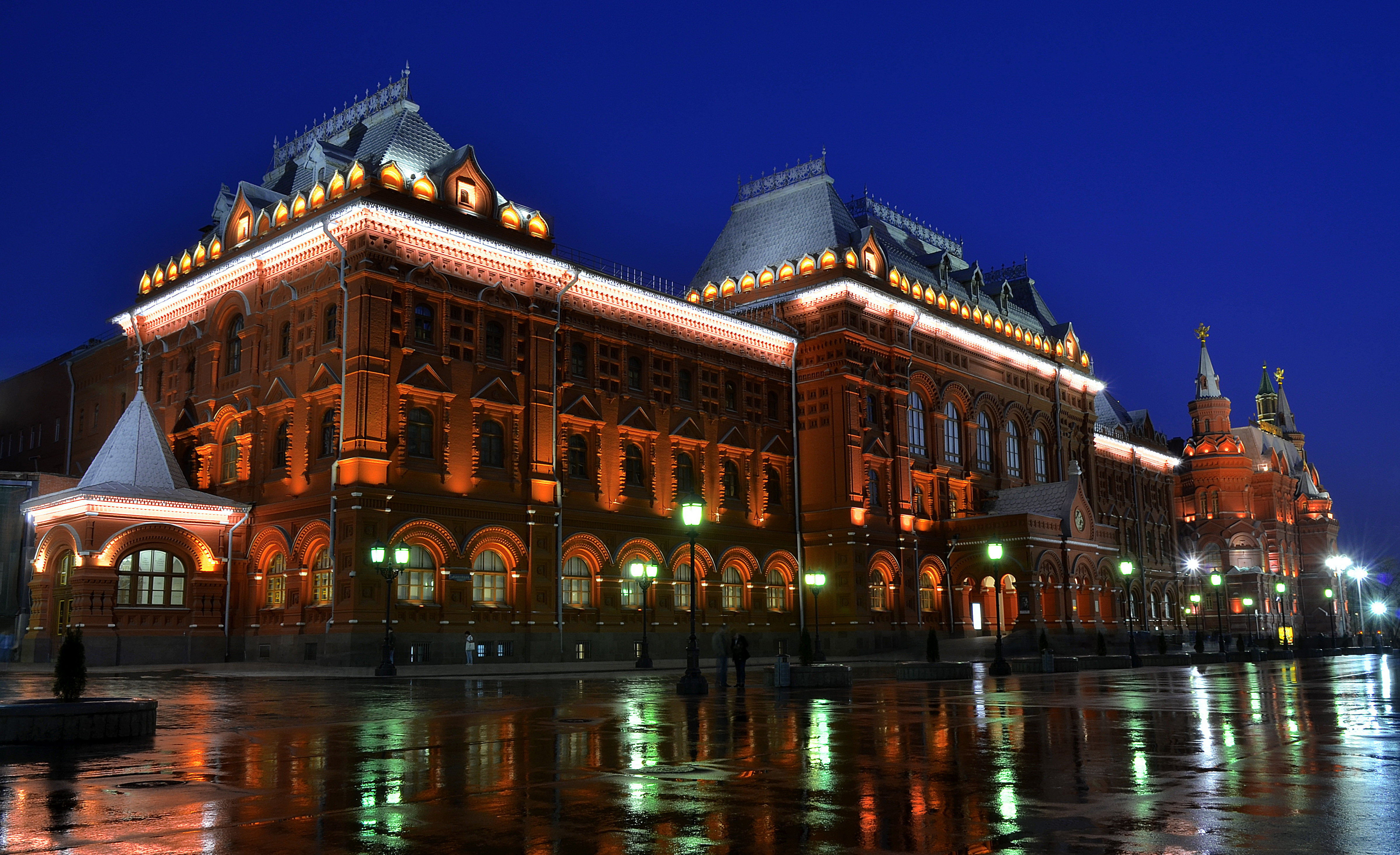 Можно увидеть здесь : You can see here